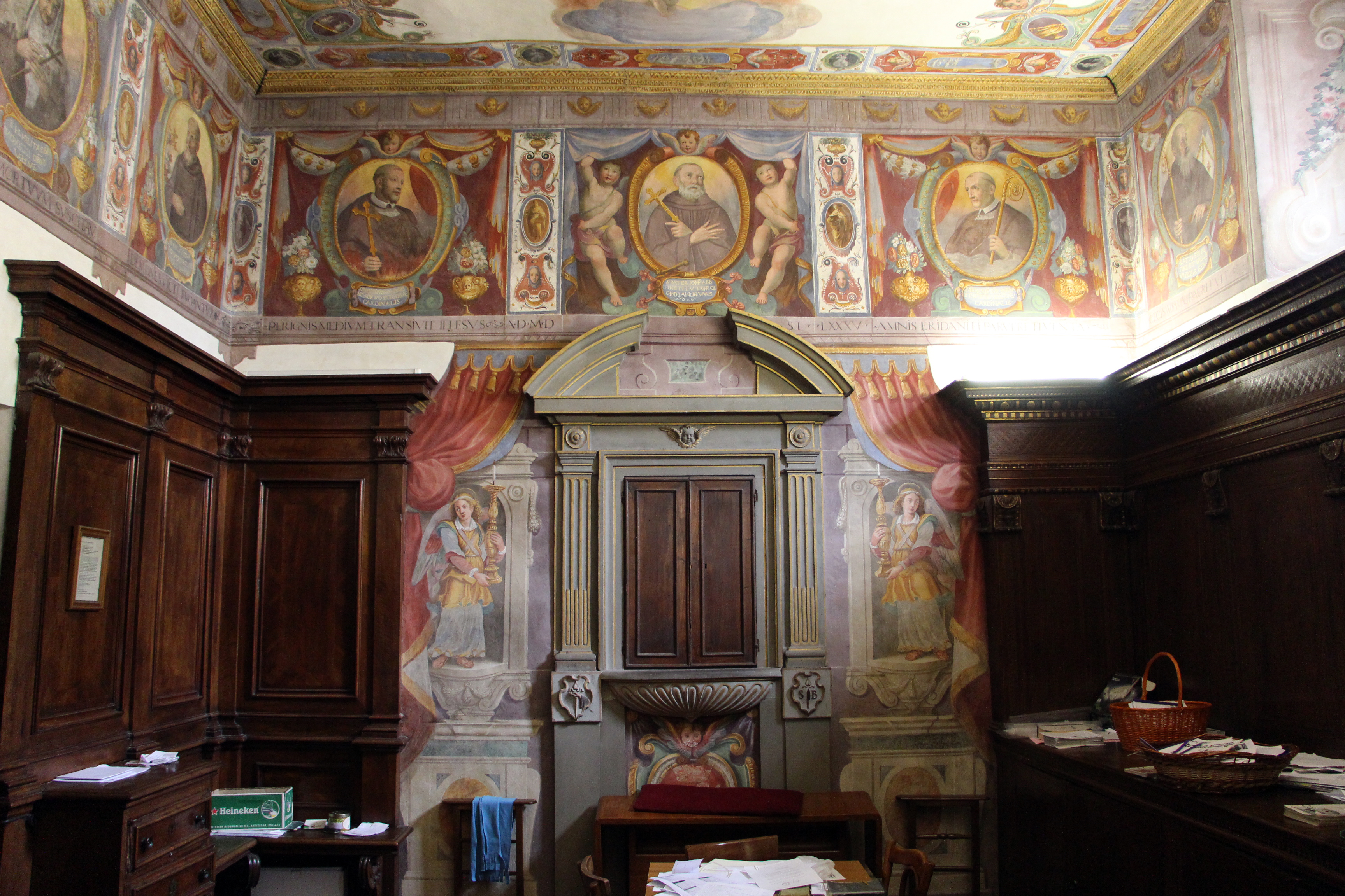 San Bartolomeo a Ripoli